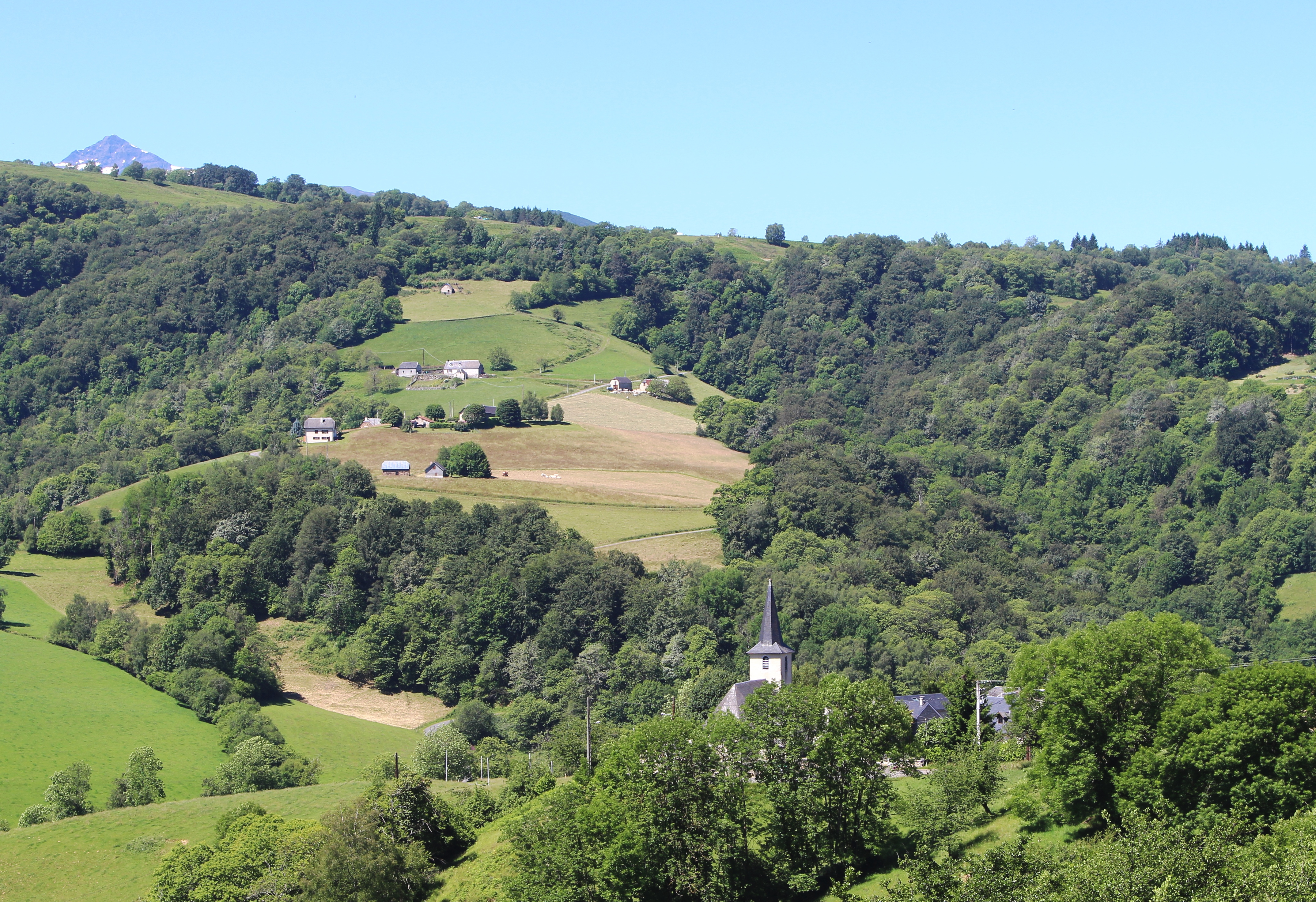 Lies (Hautes-Pyrénées)